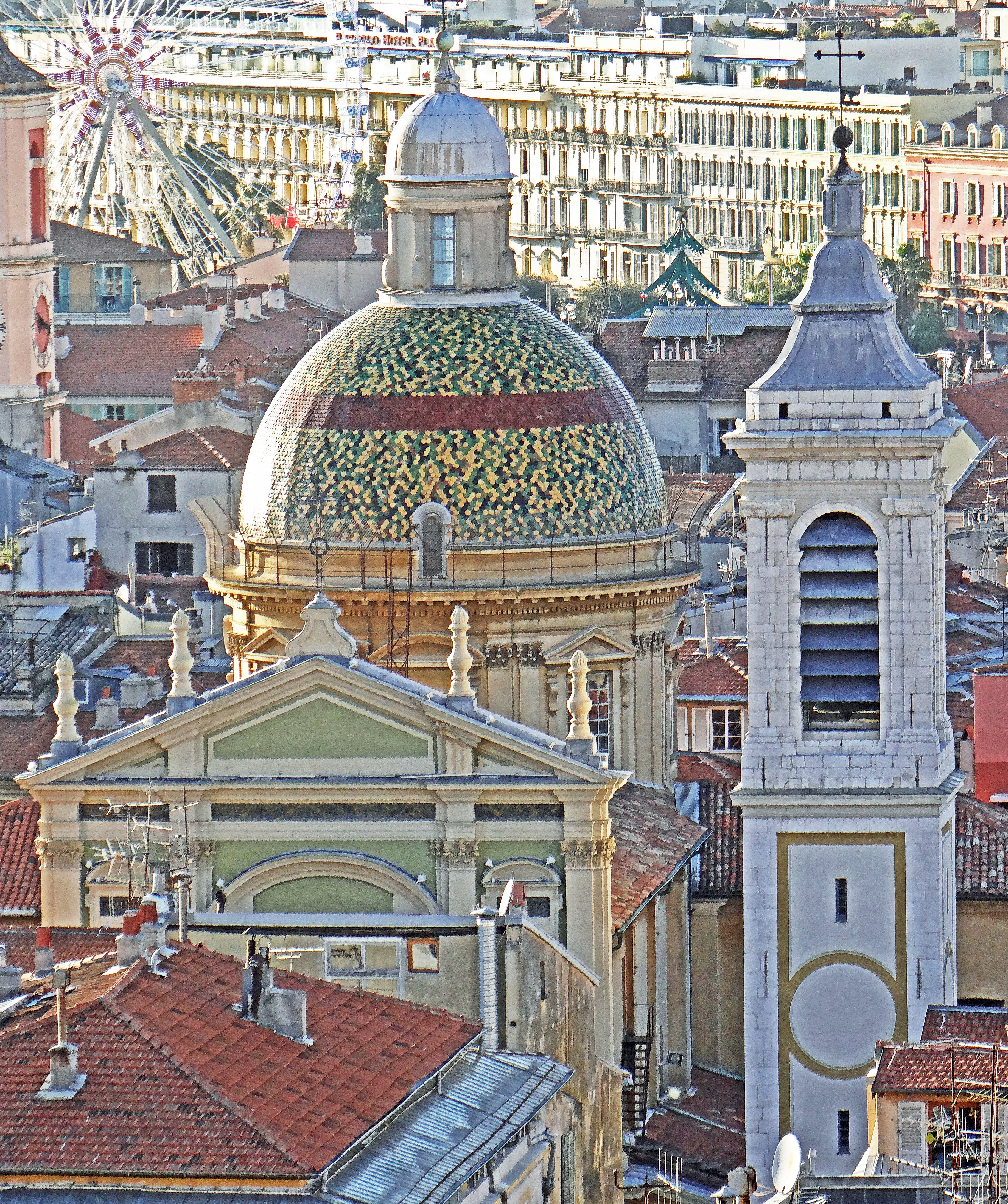 Nice - Cathédrale Sainte-Réparate vue depuis la colline du château